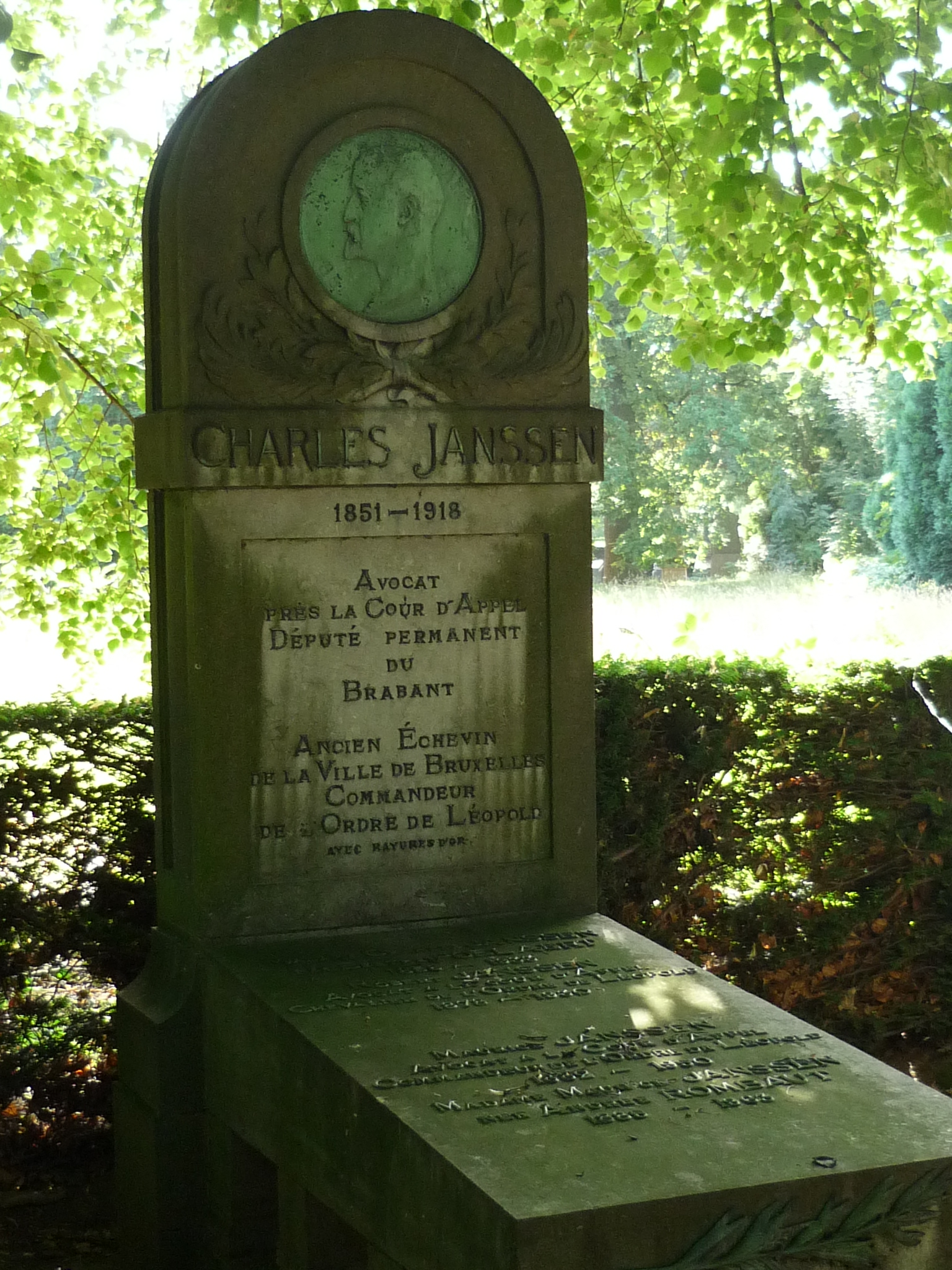 par l'architecte Henri van Dievoet, 1918, tombeau de ses cousins Charles Janssen et Berthe Poelaert, Bruxelles, Cimetière de Bruxelles à Evere, (57e avenue, section 22)